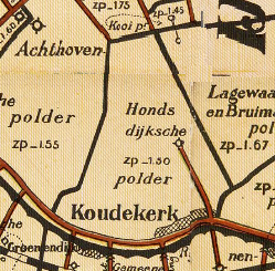 Hondsdijkse_polder